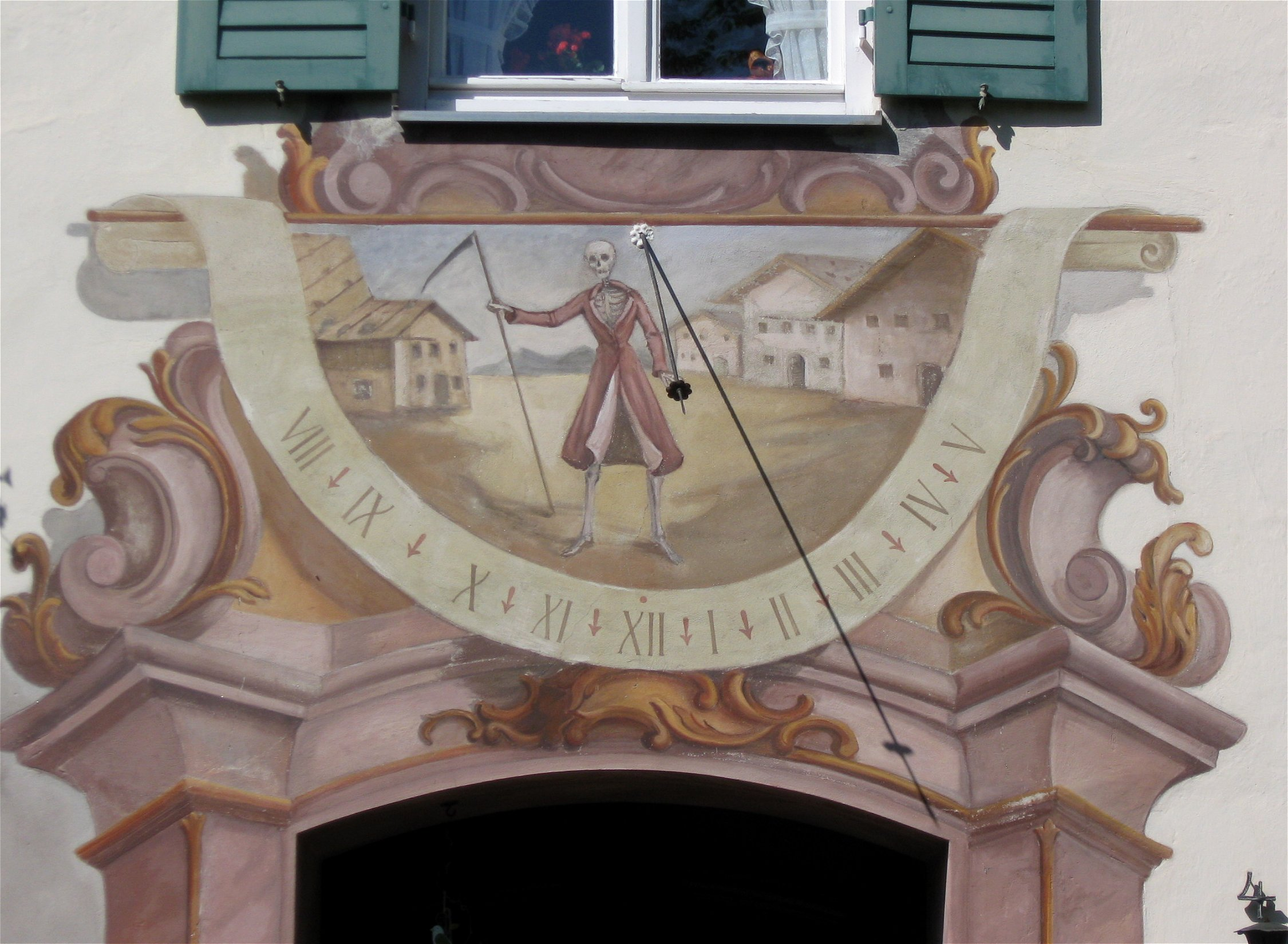 Am Gern 4, Farchant, Ehem. Benefiziatenhaus, jetzt Pfarrhaus; stattlicher Putzbau mit Flachsatteldach und Lüftlmalerei, bez. 1748, Sonnenuhr